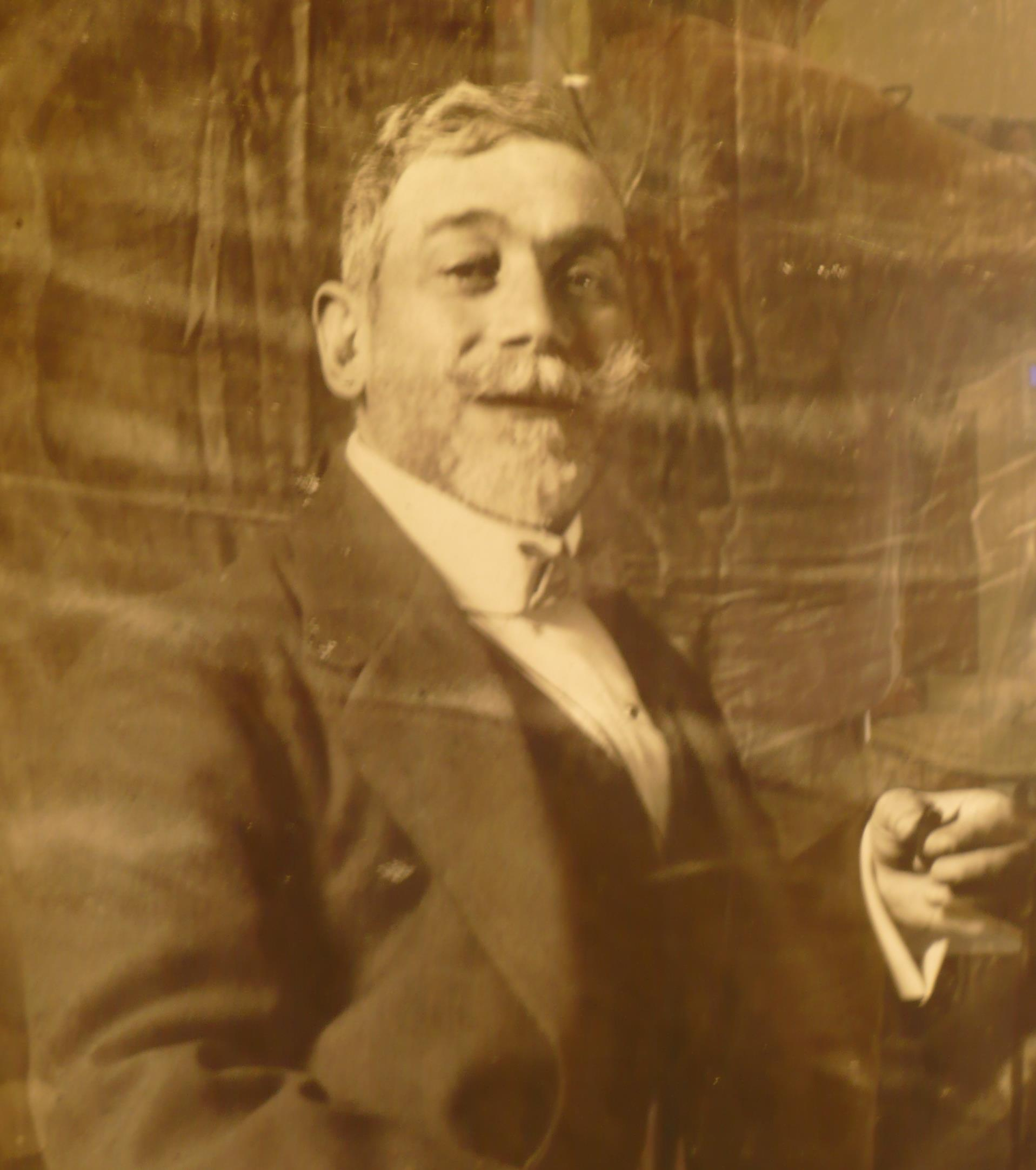 Fotoritratto di Michele Tripisciano fotoritratto in età matura